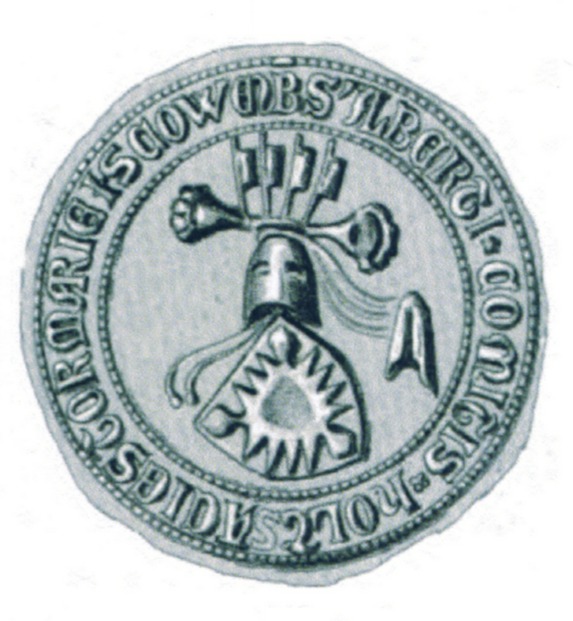 Siegel des Albrecht II. von Holstein († 28. September 1403 in Dithmarschen begraben in Itzehoe) Graf von Holstein-Segeberg 1381/1384-1403, Graf von Holstein-Rendsburg 1397-1403, Sohn des Grafen Heinrichs II. von Holstein-Rendsburg und der Ingeborg von Mecklenburg. Das Siegel stammt aus der Zeit um 1402.